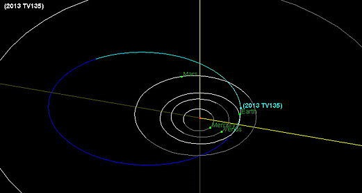 ORBITA